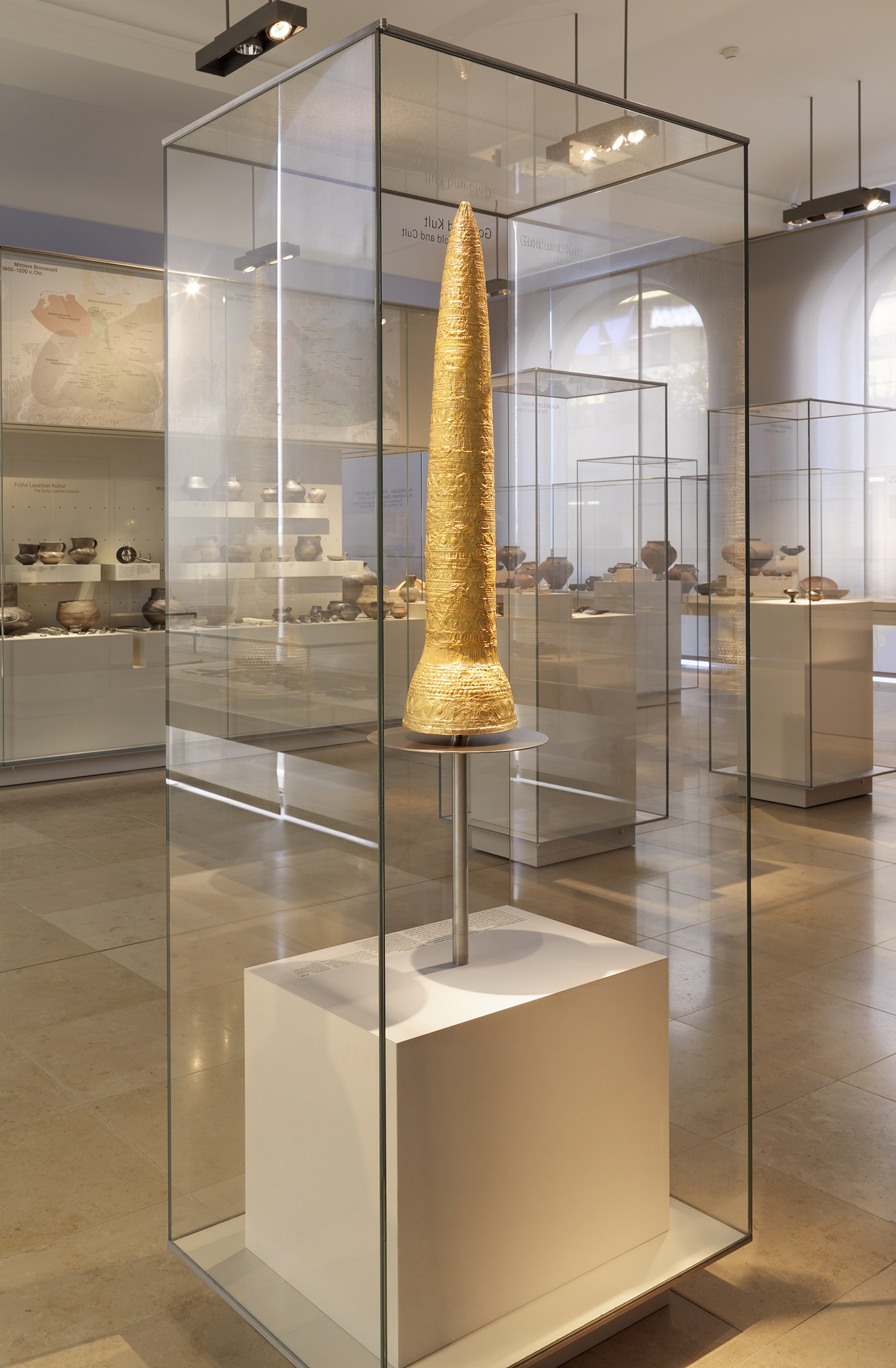 Datierung: Bronzezeit; Urnenfelderzeit Material/Technik: Gold; Bronze Maße: H. 88,5 cm; Dm. (unterer Rand) 19,75 cm im Germanischen Nationalmuseum in Nürnberg (Sammlung Vor- und Frühgeschichte)